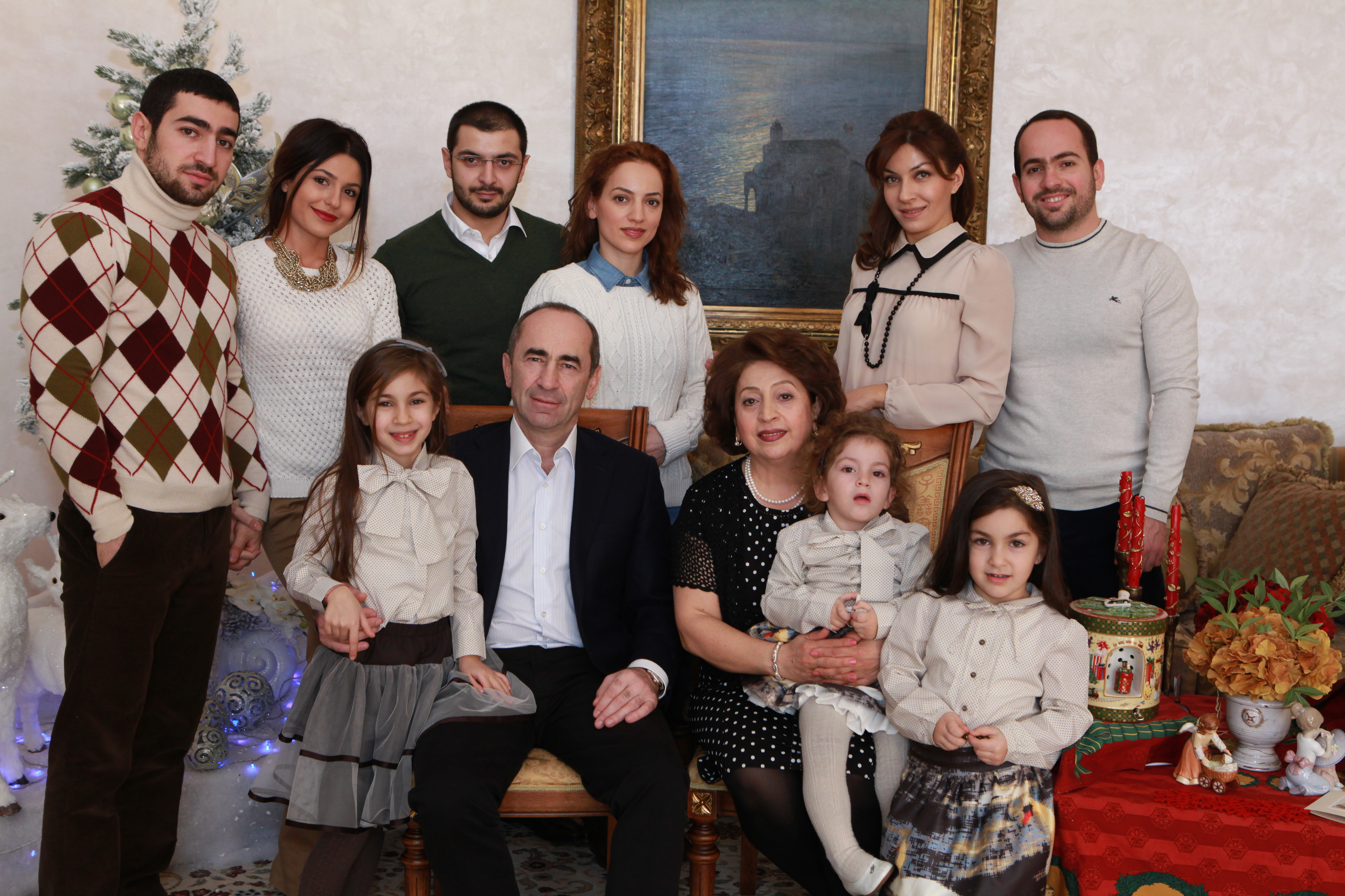 Роберт Кочарян со своей семьей, 2013